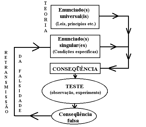 Fluxograma sobre epistemologia de Imre Lakatos: Programa de Pesquisa